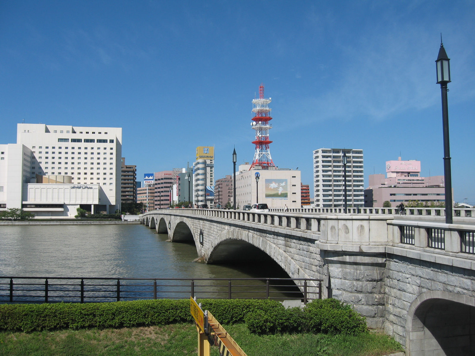 新潟市中央区。右岸側万代方面から見た萬代橋。